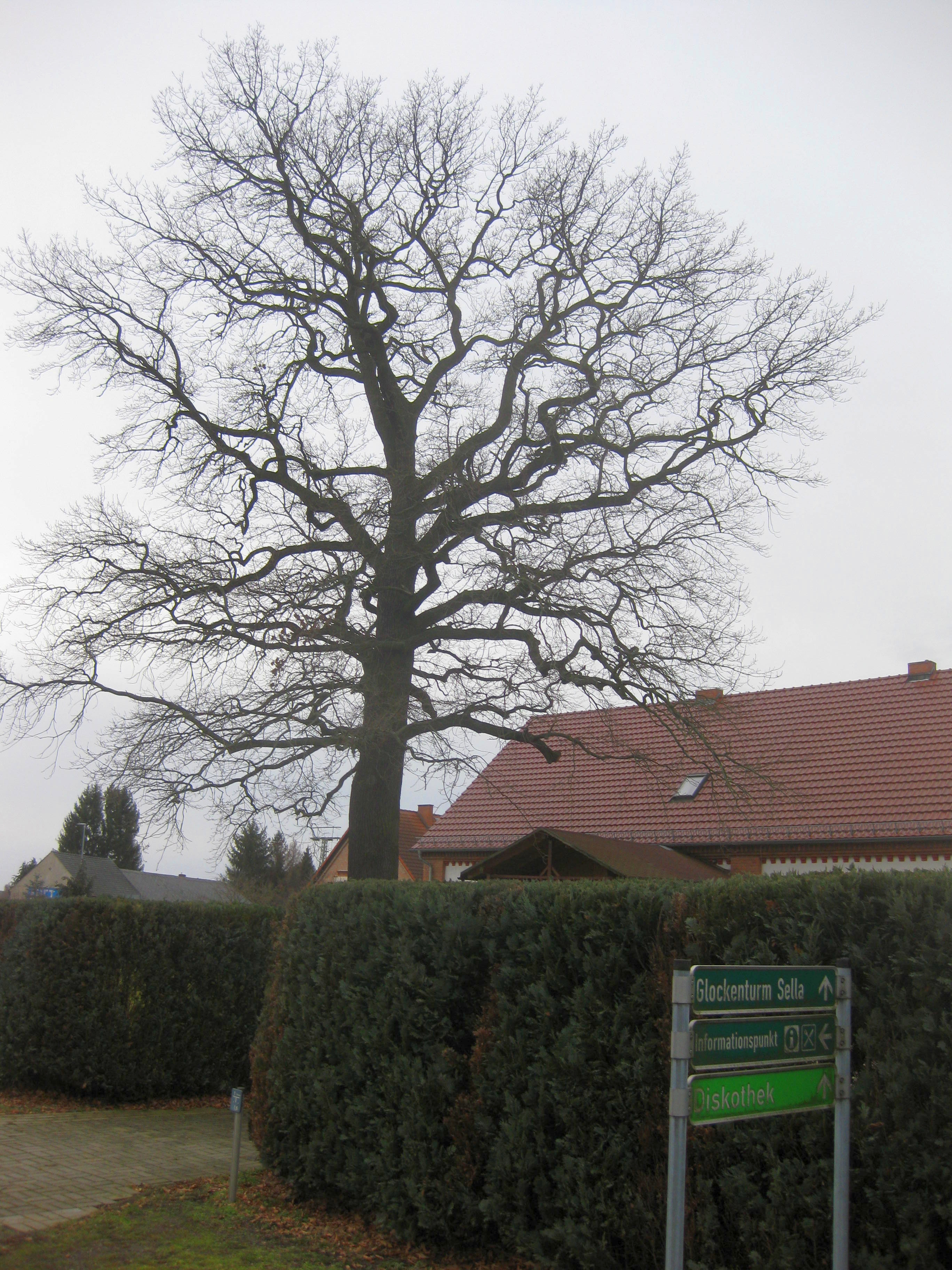 Grünewald, Hohenbockaer Straße, Stieleiche (Quercus robur, Naturdenkmal) Guteborner Straße 2, Nordostansicht, Vorwinter